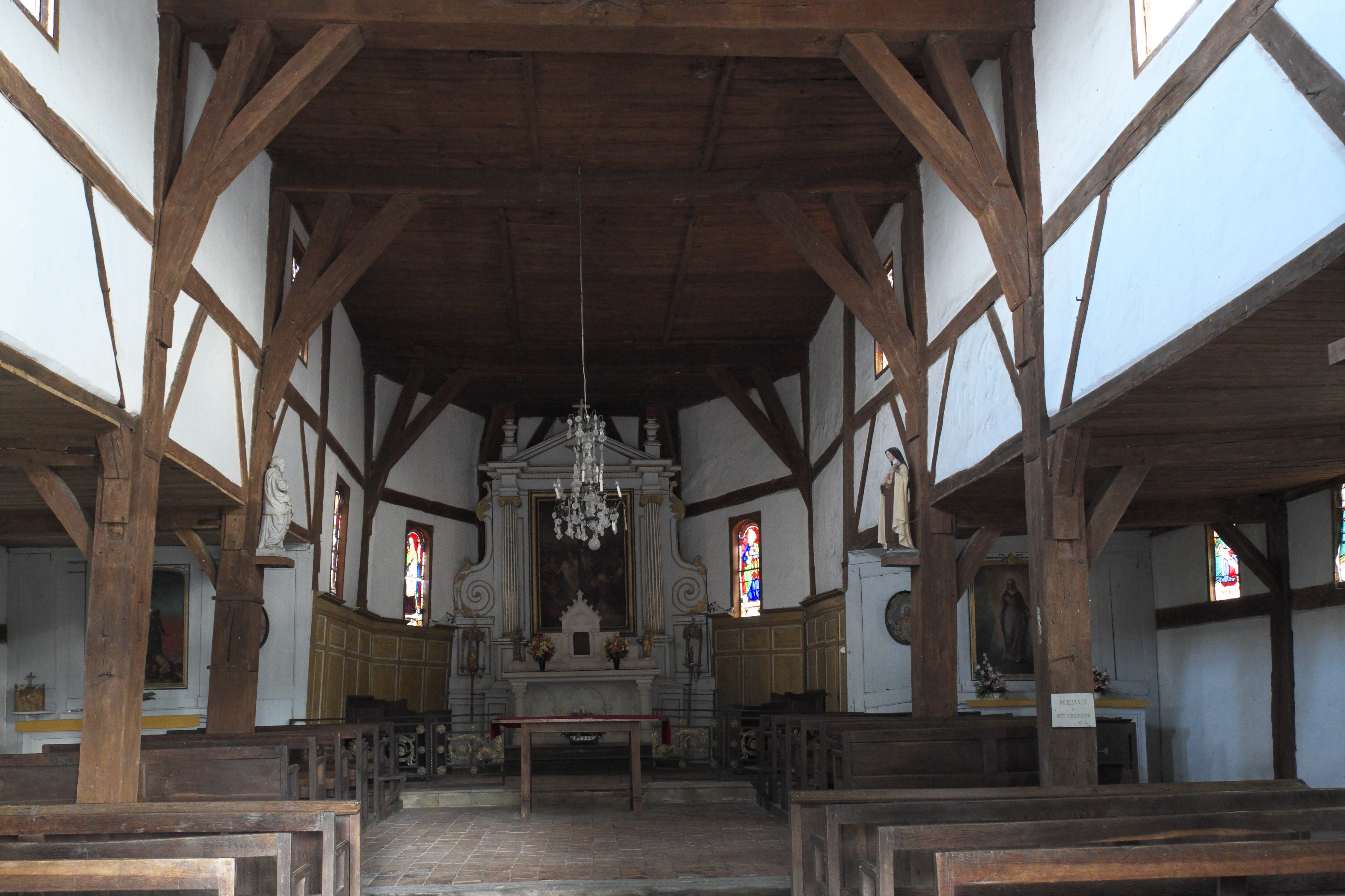 Katholische Kirche Exaltation-de-la-Sainte-Croix in Bailly-le-Franc im Département Aube (Champagne-Ardenne/Frankreich) .